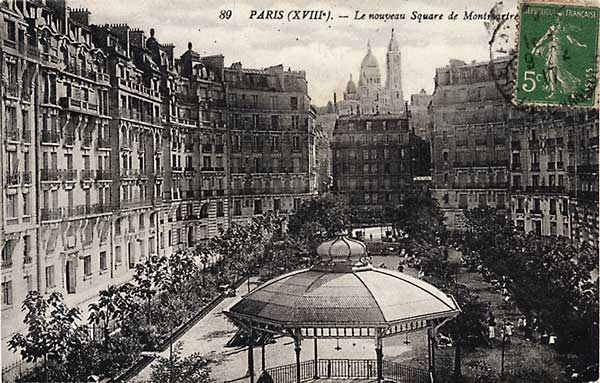 Le square Montmartre, réalisé par l'architecte Pierre Humbert, aujourd'huisquare Maurice-Kriegel-Valrimont.